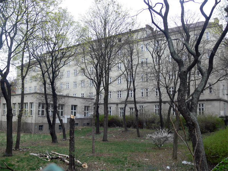 Männerwohnheim Meldemannstraße 27, Wien, Österreich